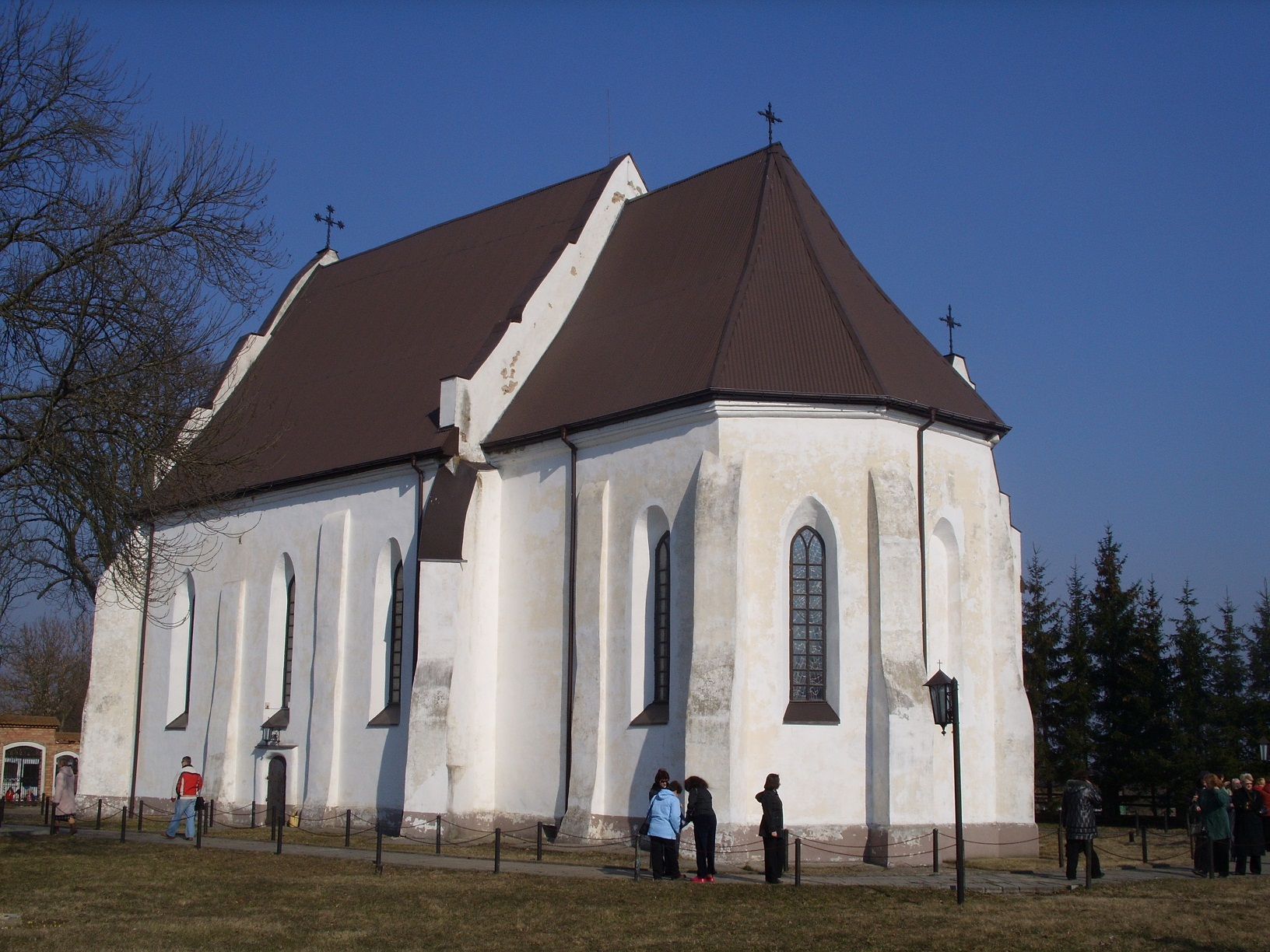 Беларуская (тарашкевіца): Троіцкі касьцёл. в. Ішкальдзь This is a photo of Belarusian heritage monument. Reference number: 112Г000057 ( WLM)